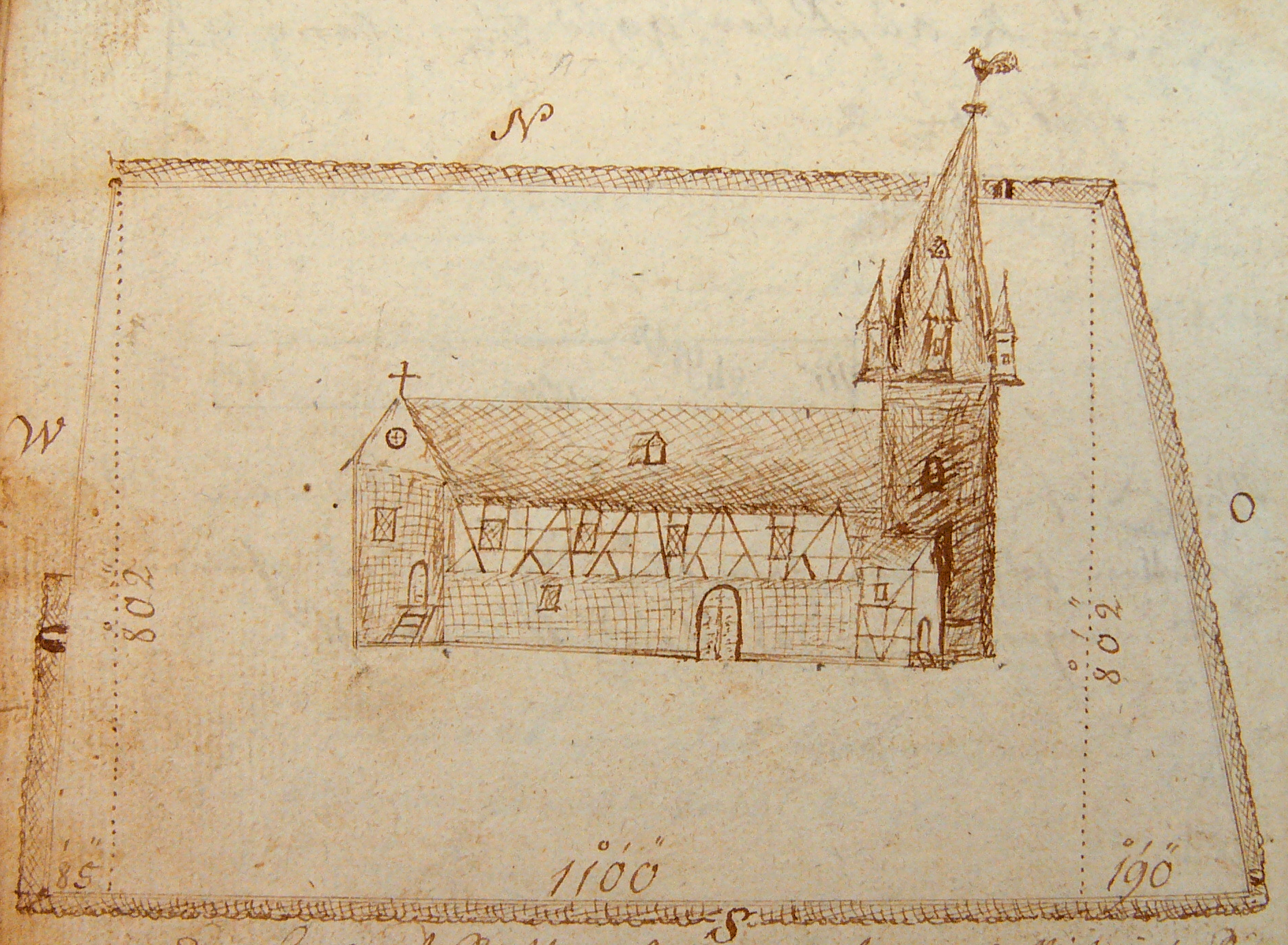 Evangelische Kirche Griedel, Hessen, Deutschland